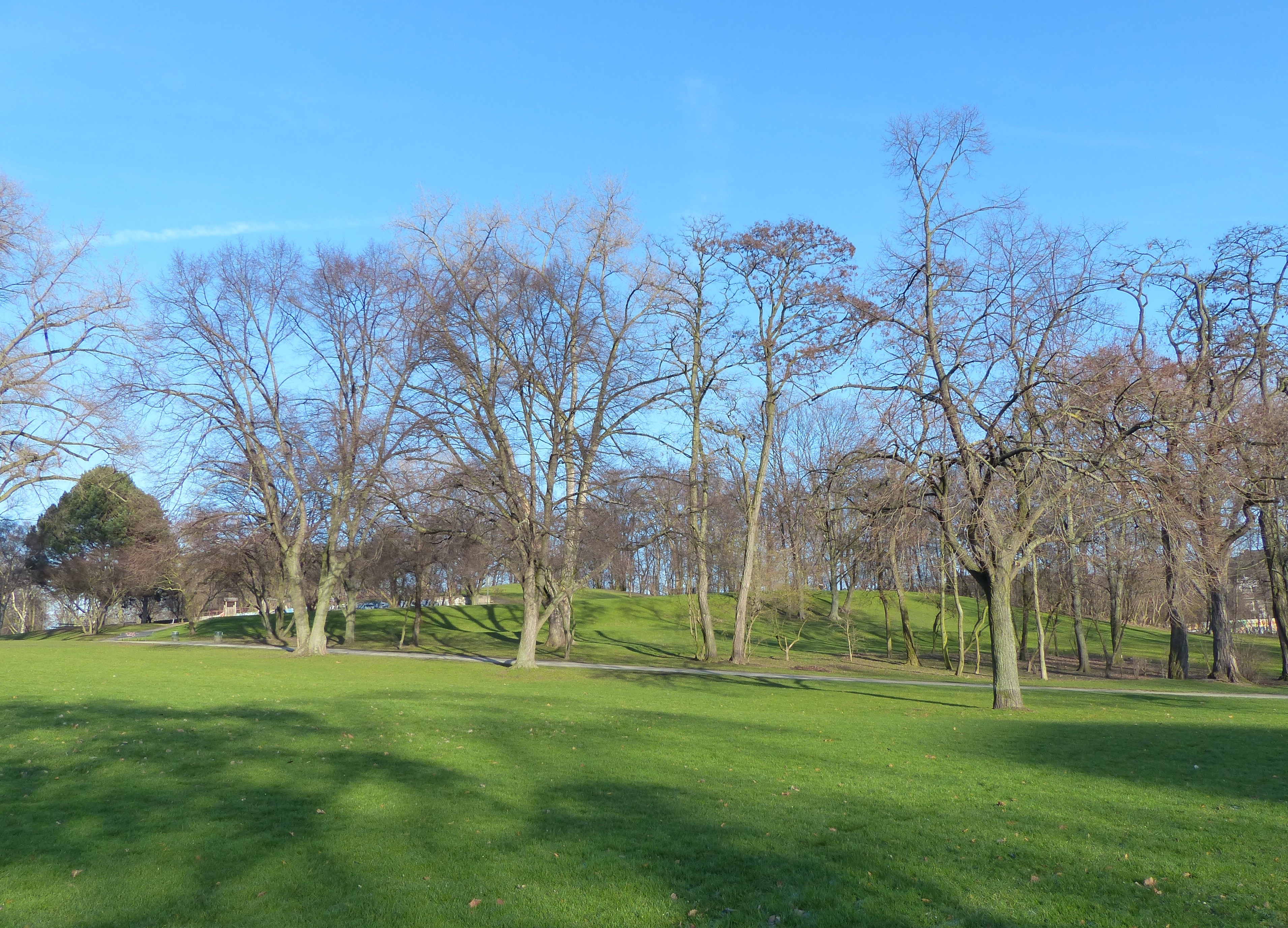 Hiroshima-Nagasaki-Park in Köln